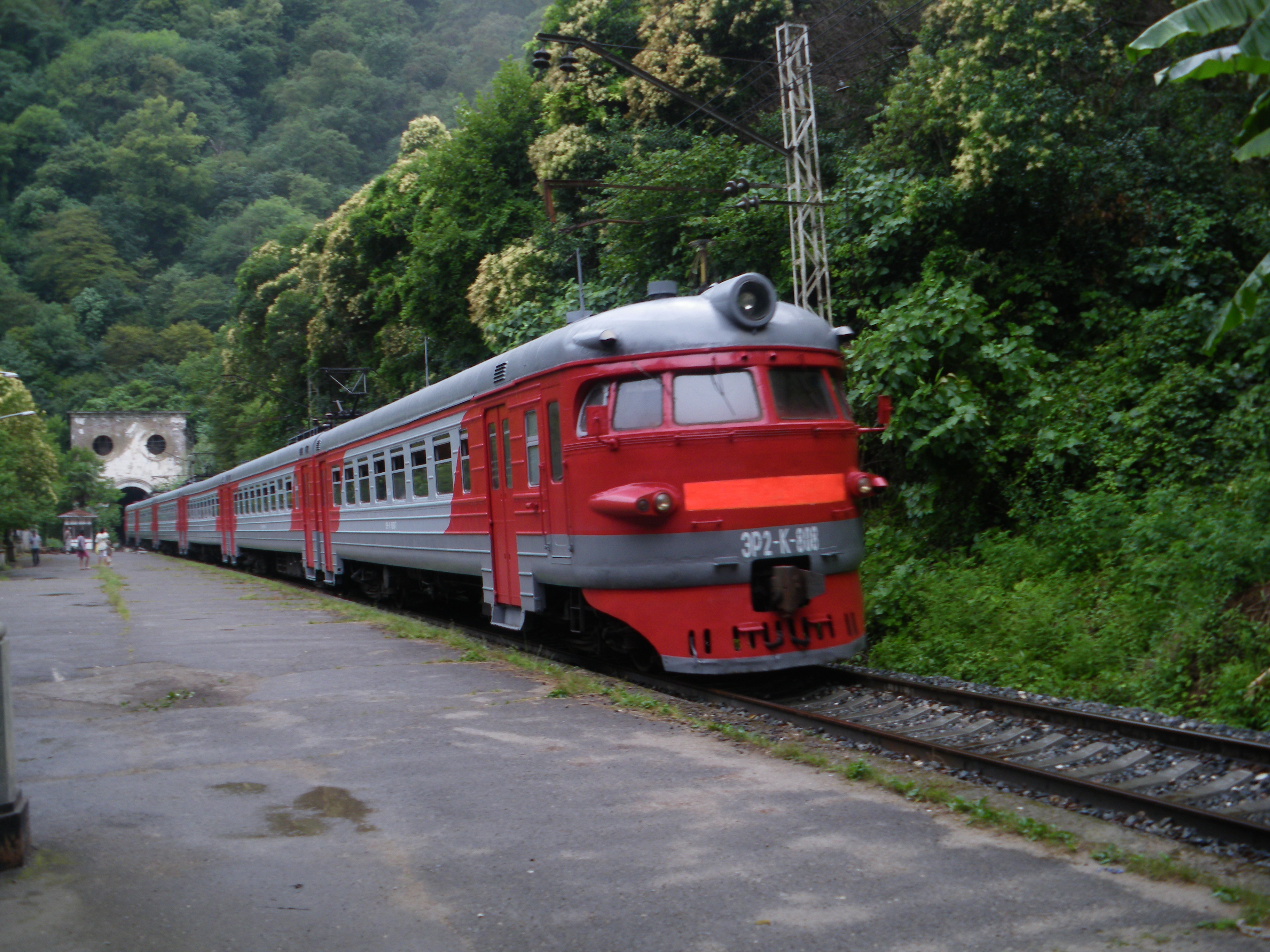 Проходящая электричка. Станция Псырцха